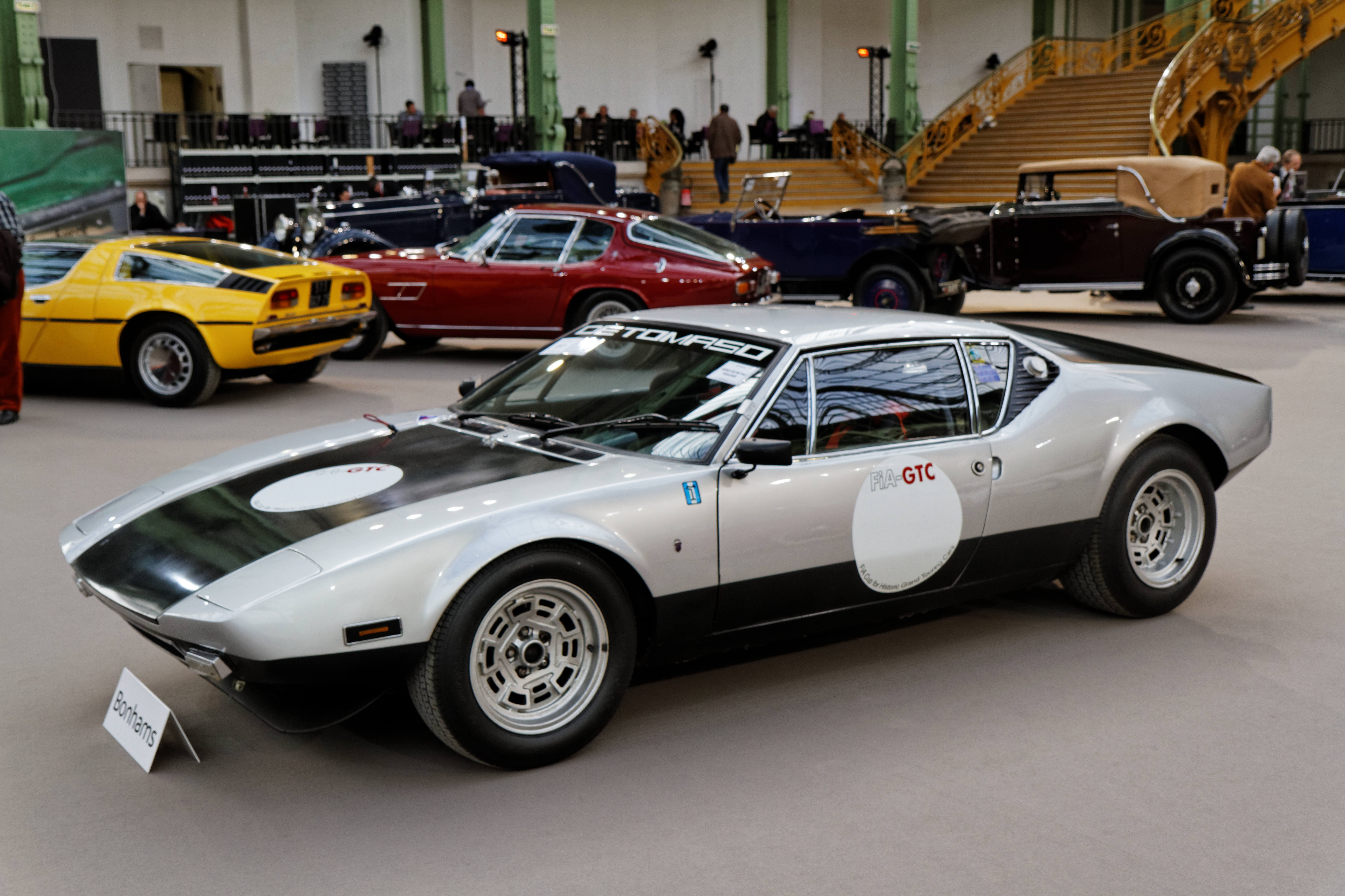 Une De Tomaso Pantera Group 3 au Grand Palais lors de la vente Bonhams en février 2014.